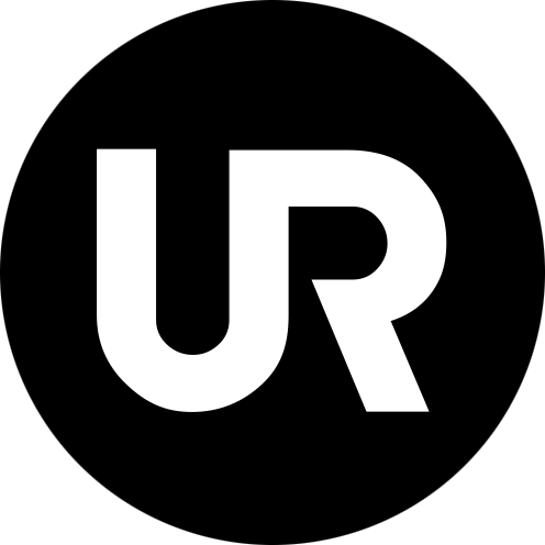 Utbildningsradions logotyp